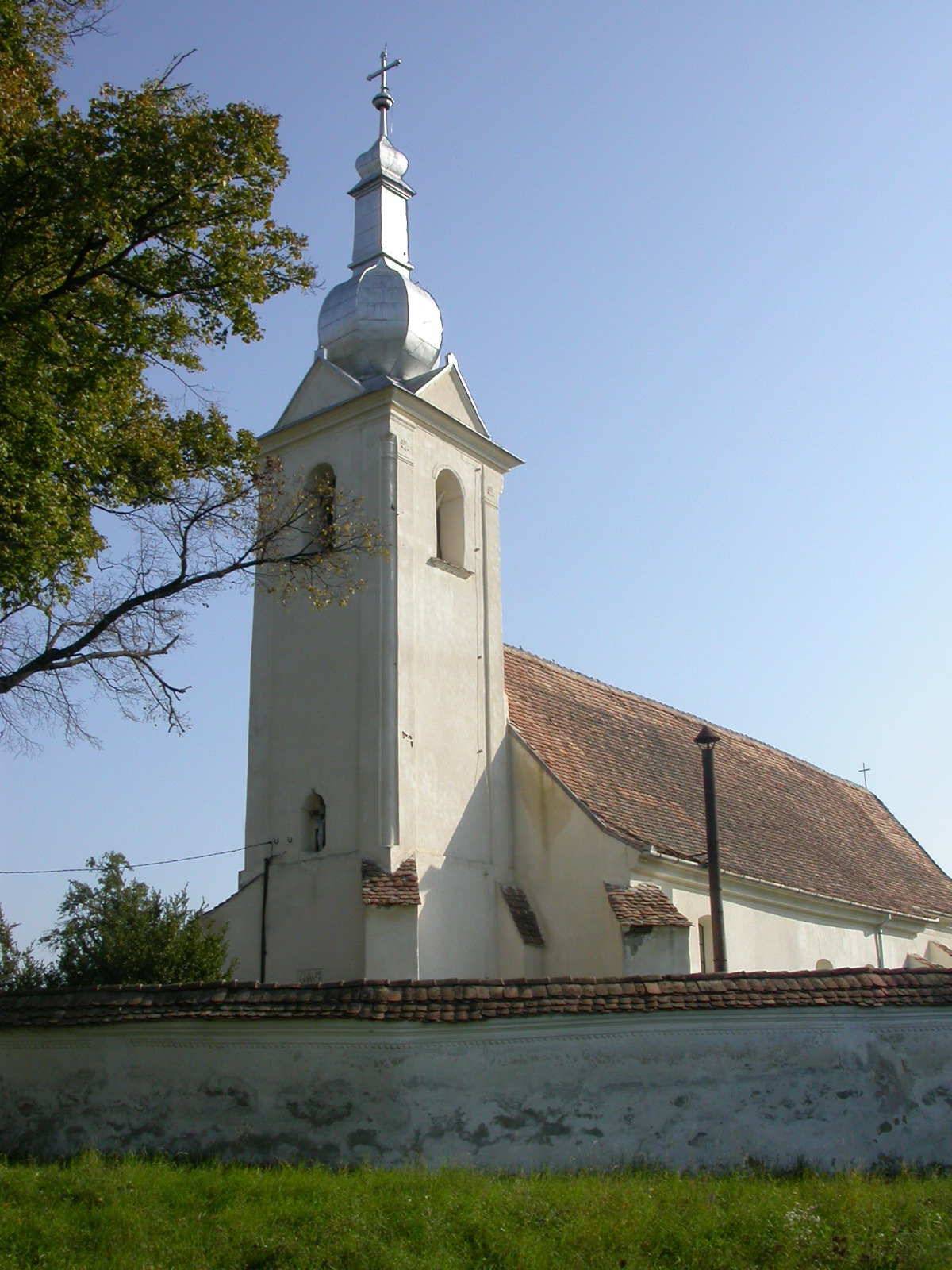 Ansamblul bisericii romano-catolice, sec. XIII - XVIII